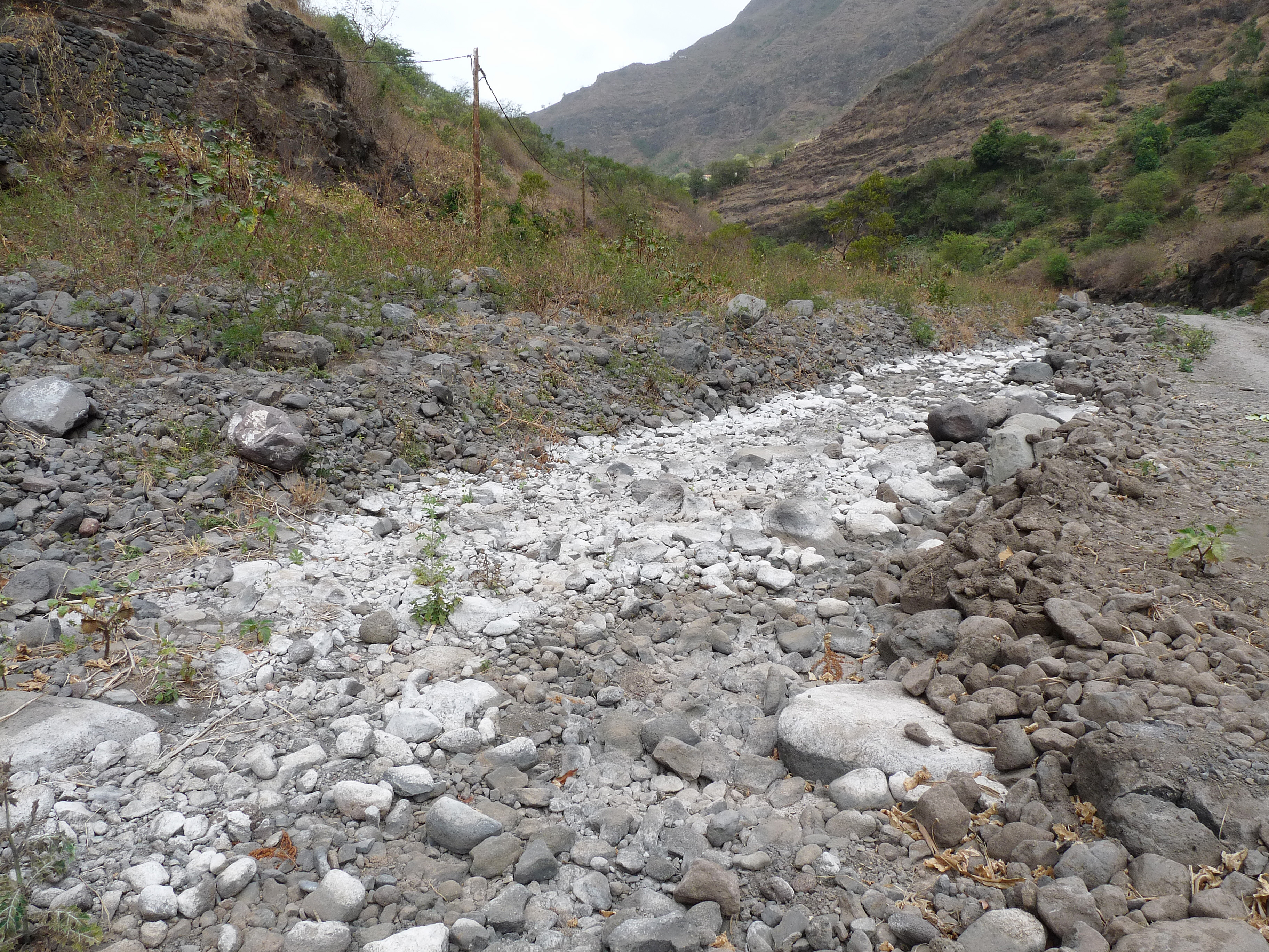 Ribeira Principal (île de Santiago, Cap-Vert)